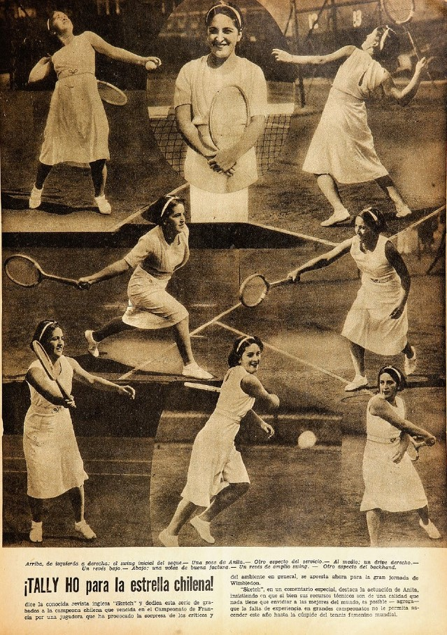 Arriba, de izquierda a derecha: el swing inicial del saque-.- Una pose de Anita. - Otro aspecto del servicio.- Al medio; un drive derecho.- Un revés bajo-.- Abajo: una volea de buena factura.- Un revés de amplio swing.- Otro aspecto del backhand.